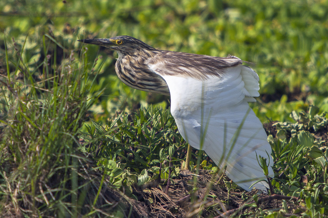 Madagascar Squacco Heron - Mara - Kenya(6)